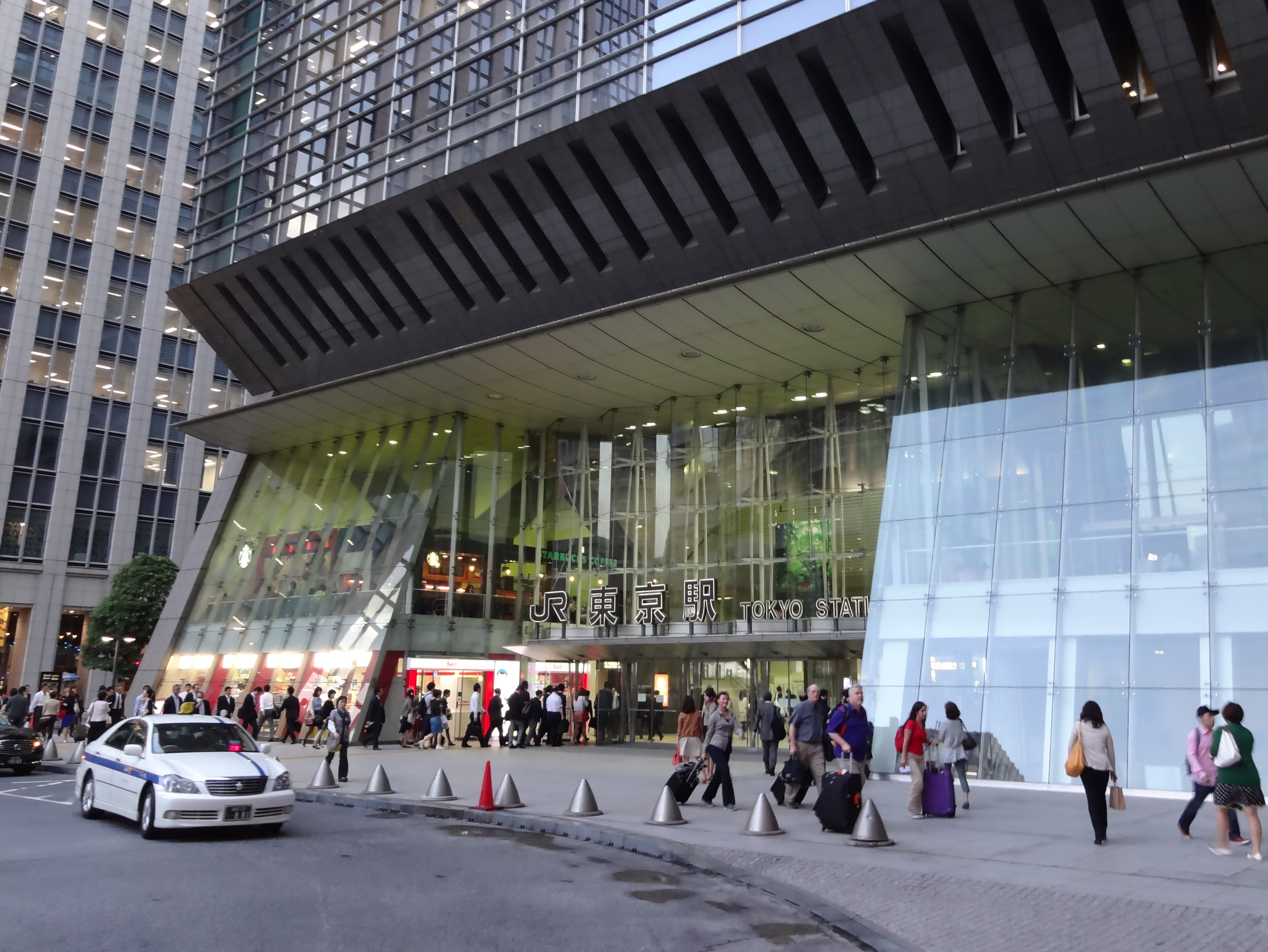 東京駅日本橋口の外観。